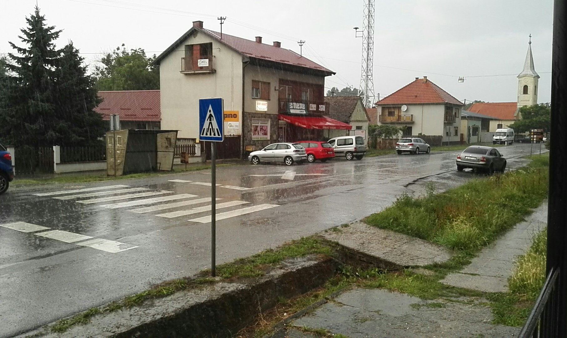 Српски (ћирилица): Beničanci, crkva